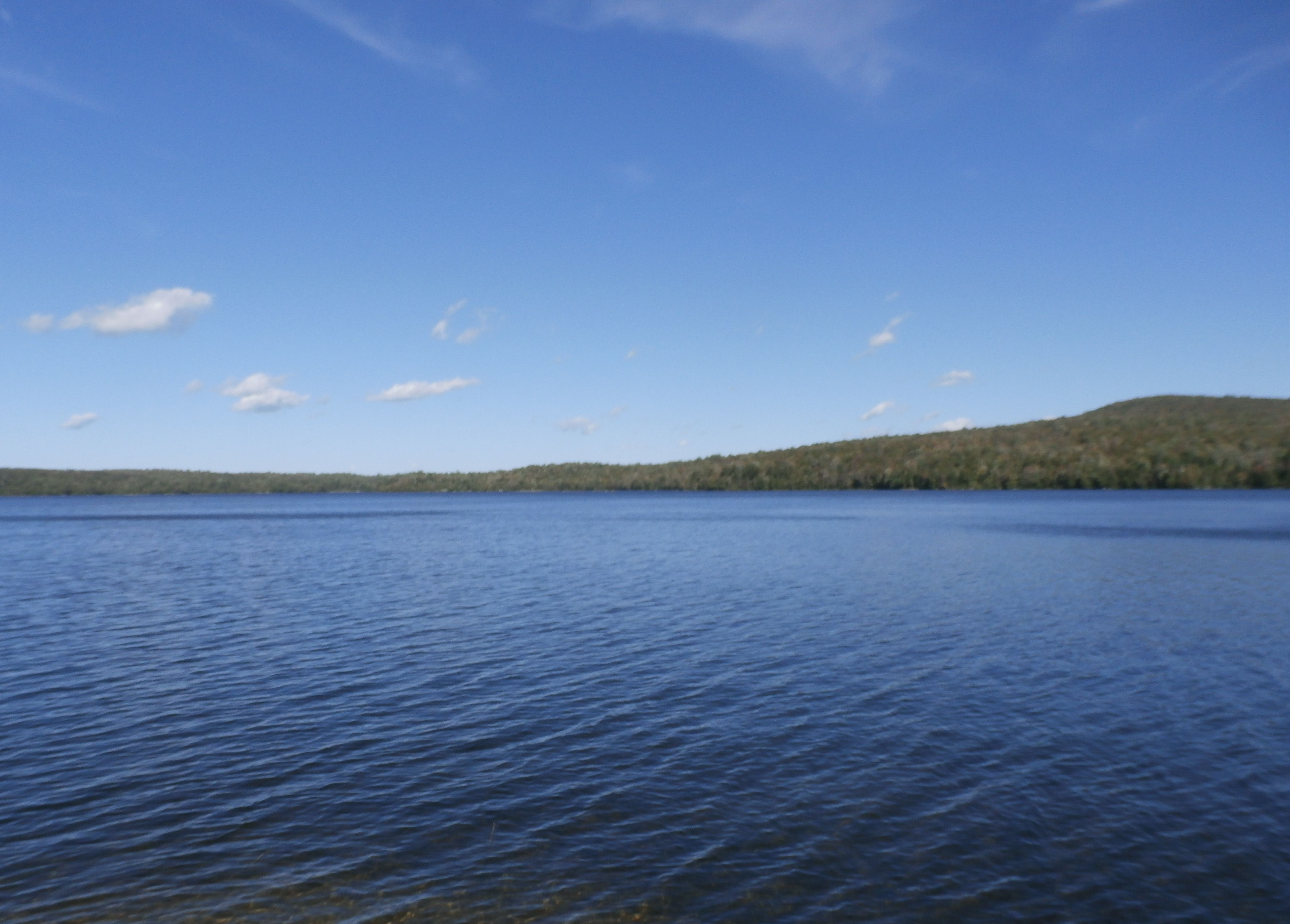 Lac Maskinongé à Stratford vu depuis la rive sud; le Parc national de Frontenac est sur la rive en face.